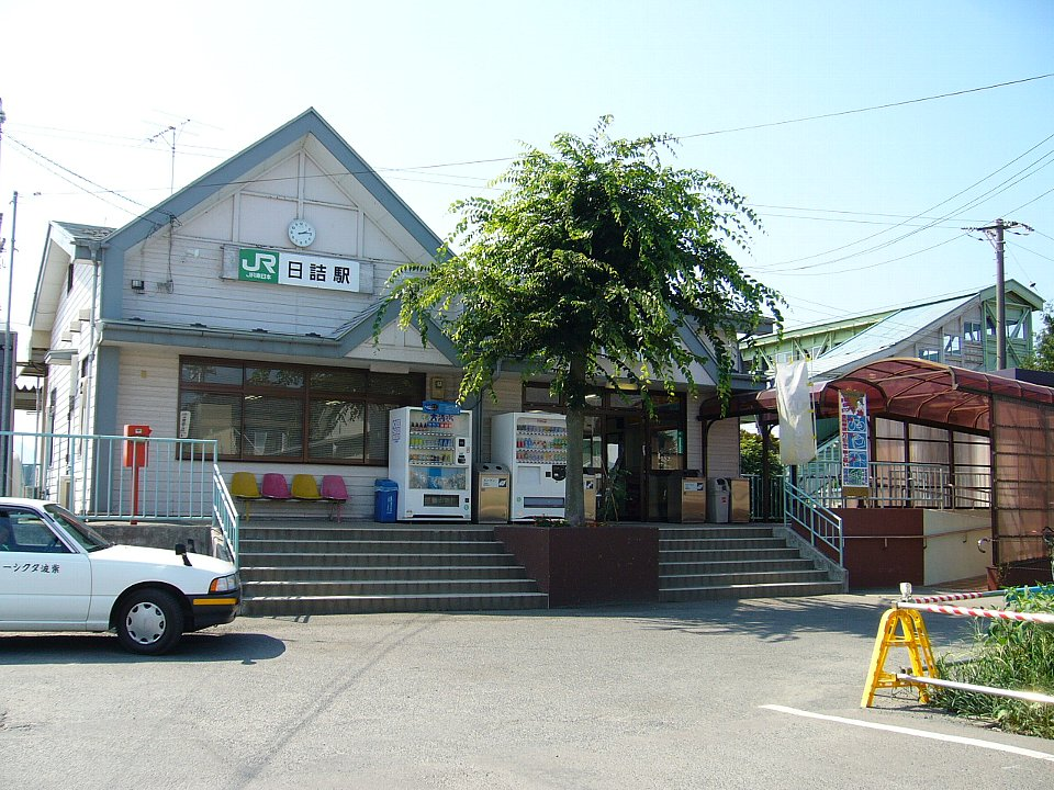 Hizume Station, Shiwa, Iwate, Japan